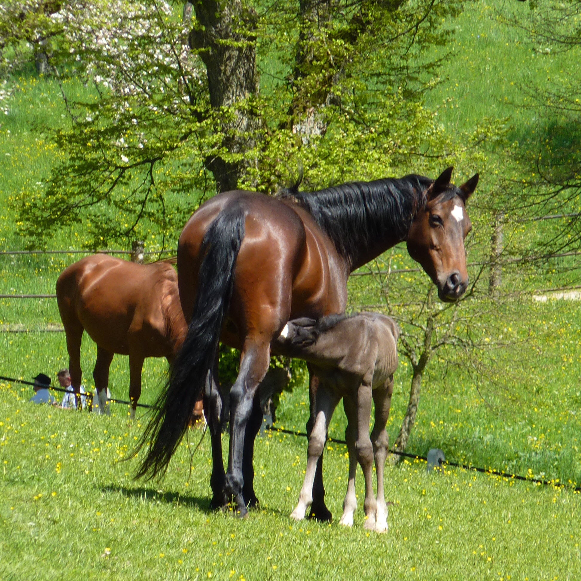 auf dem Haupt- und Landgestüt Marbach